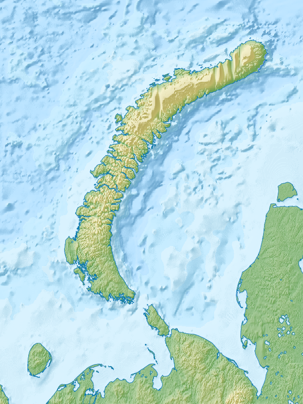 Архипелаг Новая Земля (Россия), физическая карта. Координаты для GMT: -R45.8/72.2/68.0/78.0 Инструменты: GMT